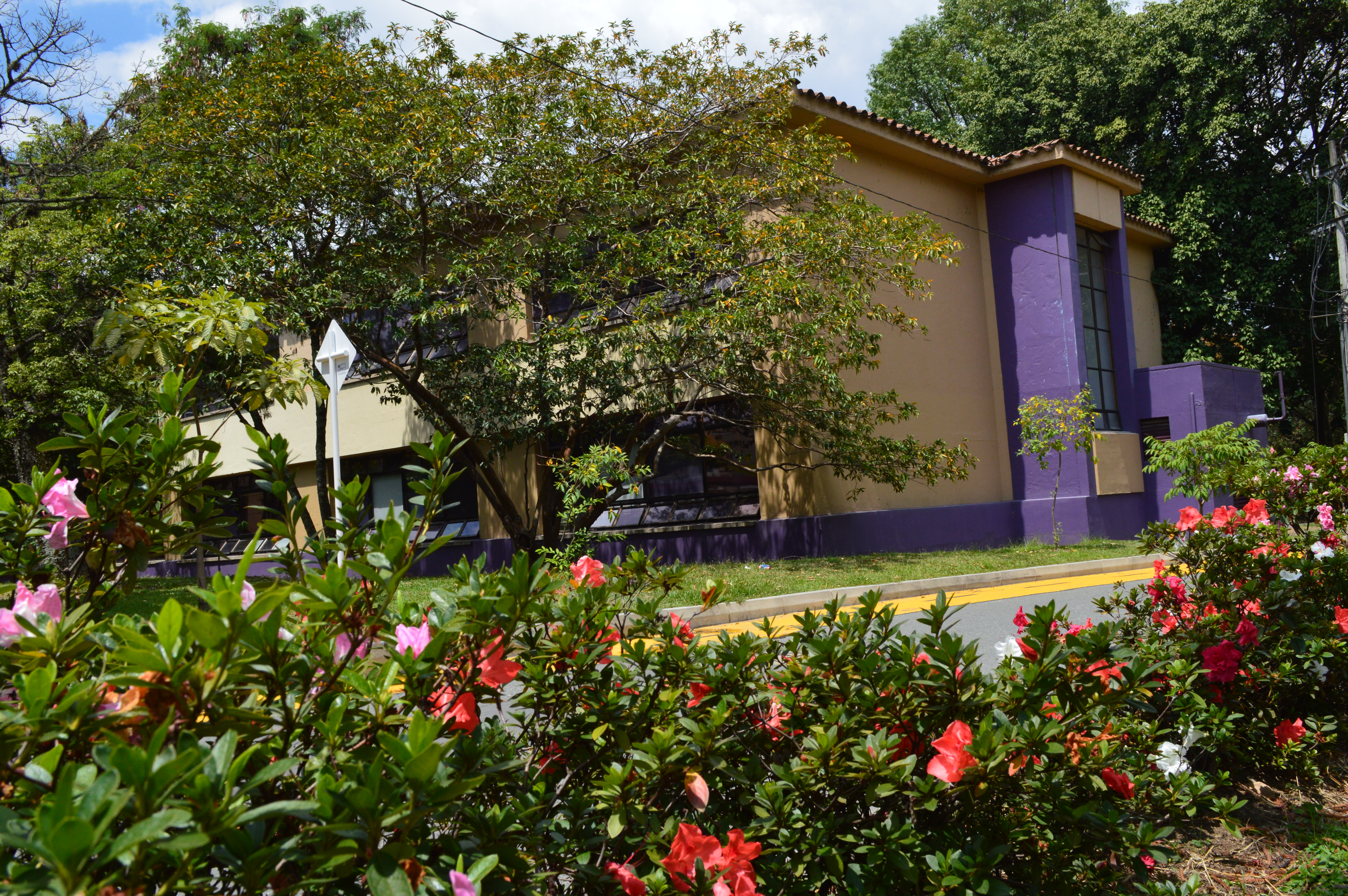 Foto lateral